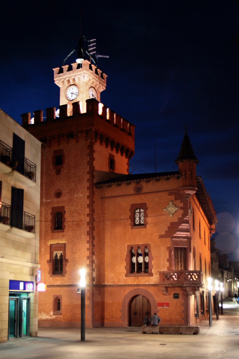 Can Modolell